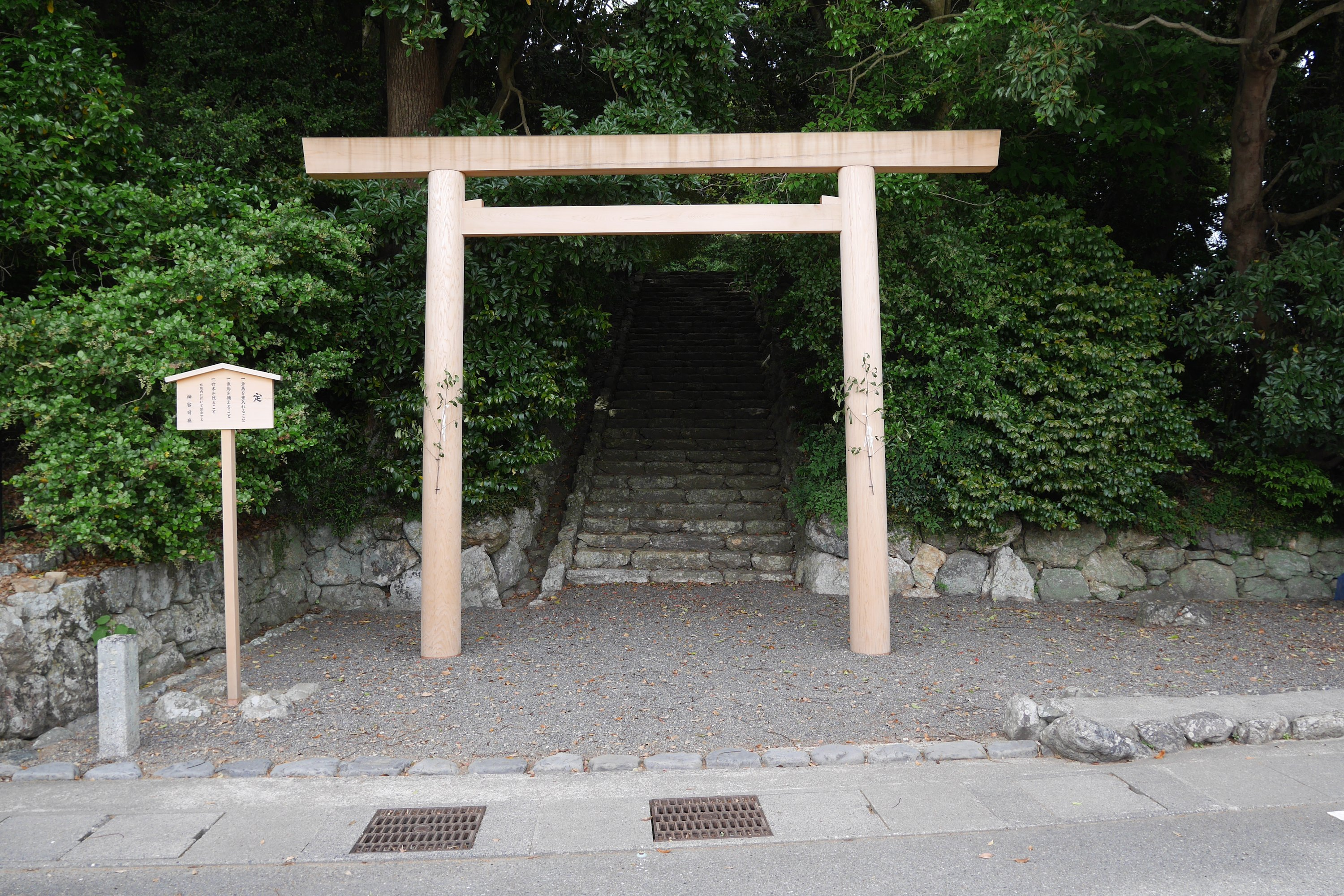 日本の三重県志摩市にある皇大神宮別宮伊雑宮所管社佐美長神社（さみながじんじゃ）の鳥居。